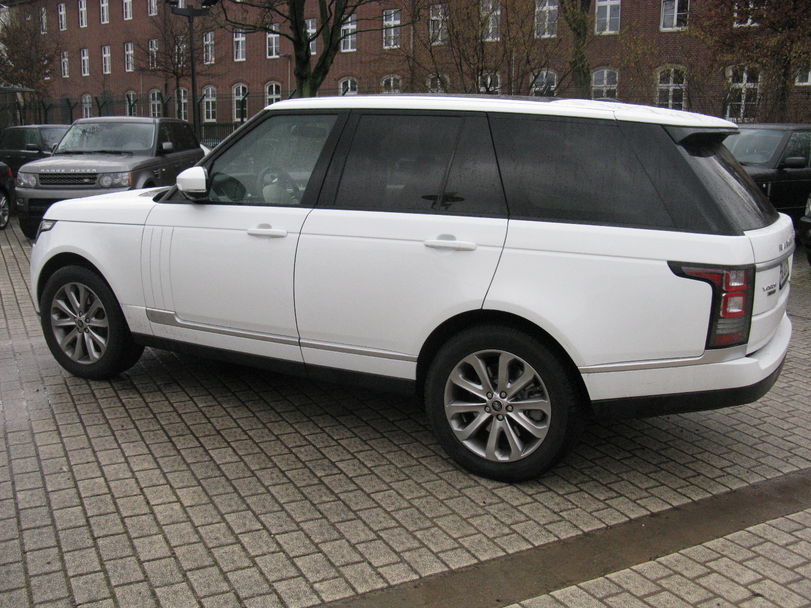 Range Rover